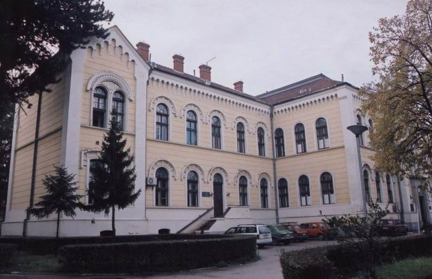 Zgrada stare hirurgije. Jedna od tri prvoizgrađene zgrade u VB Niš u 19 veku